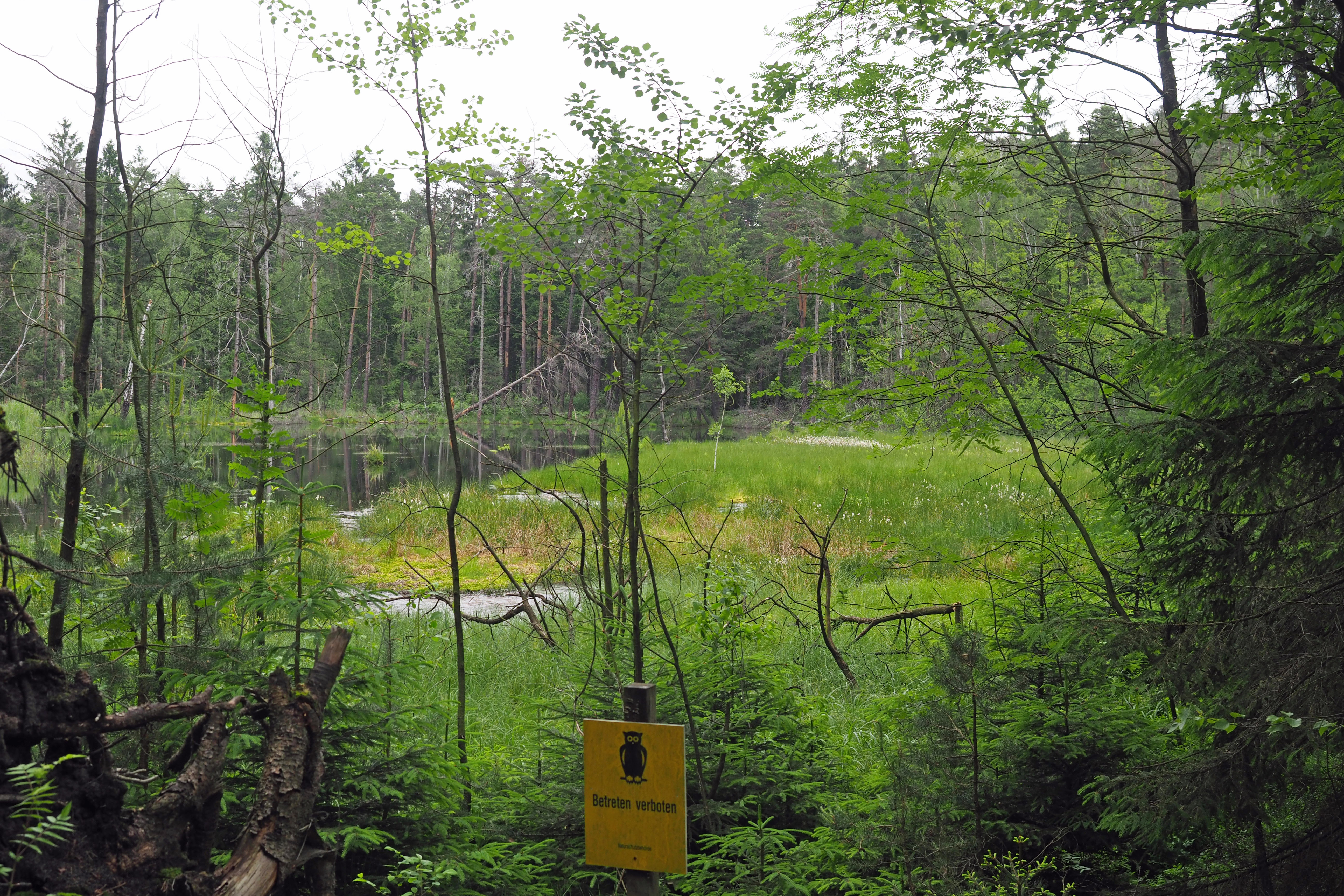 Naturschutzgebiet Waldmoore bei Großdittmannsdorf